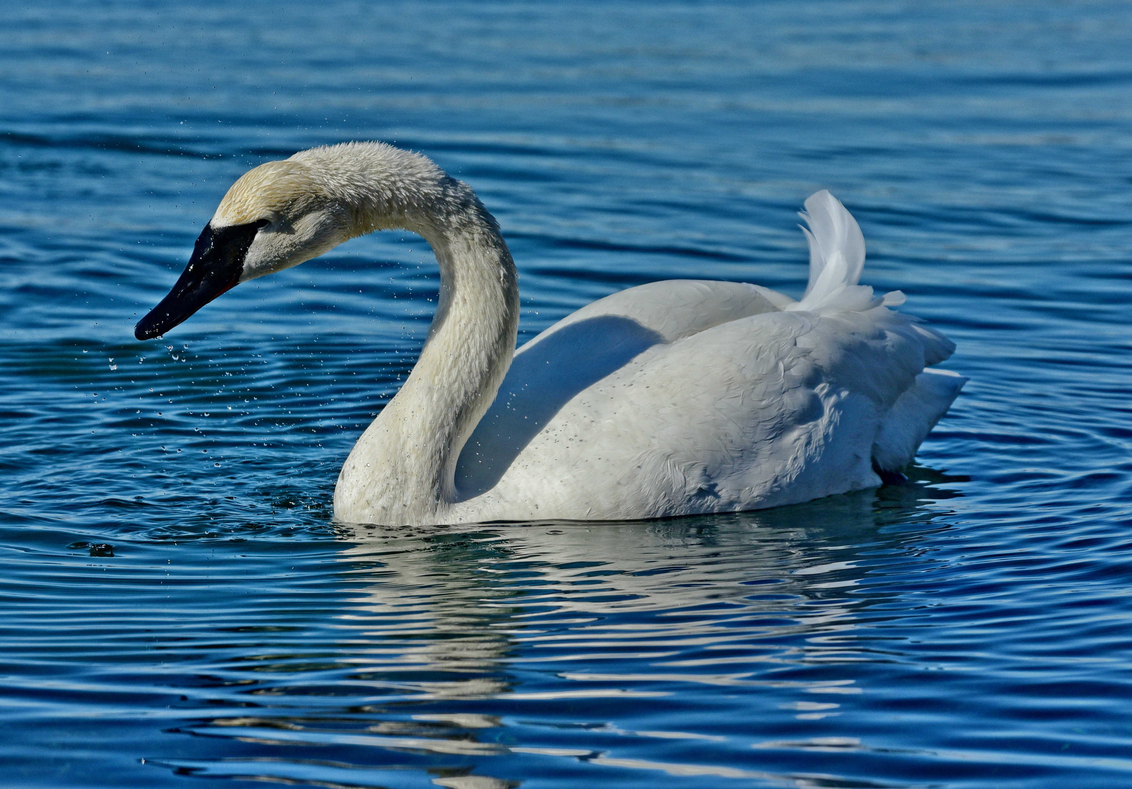 Лебідь-трубач (Cygnus buccinator) плаває на озері Онтаріо в Торонто